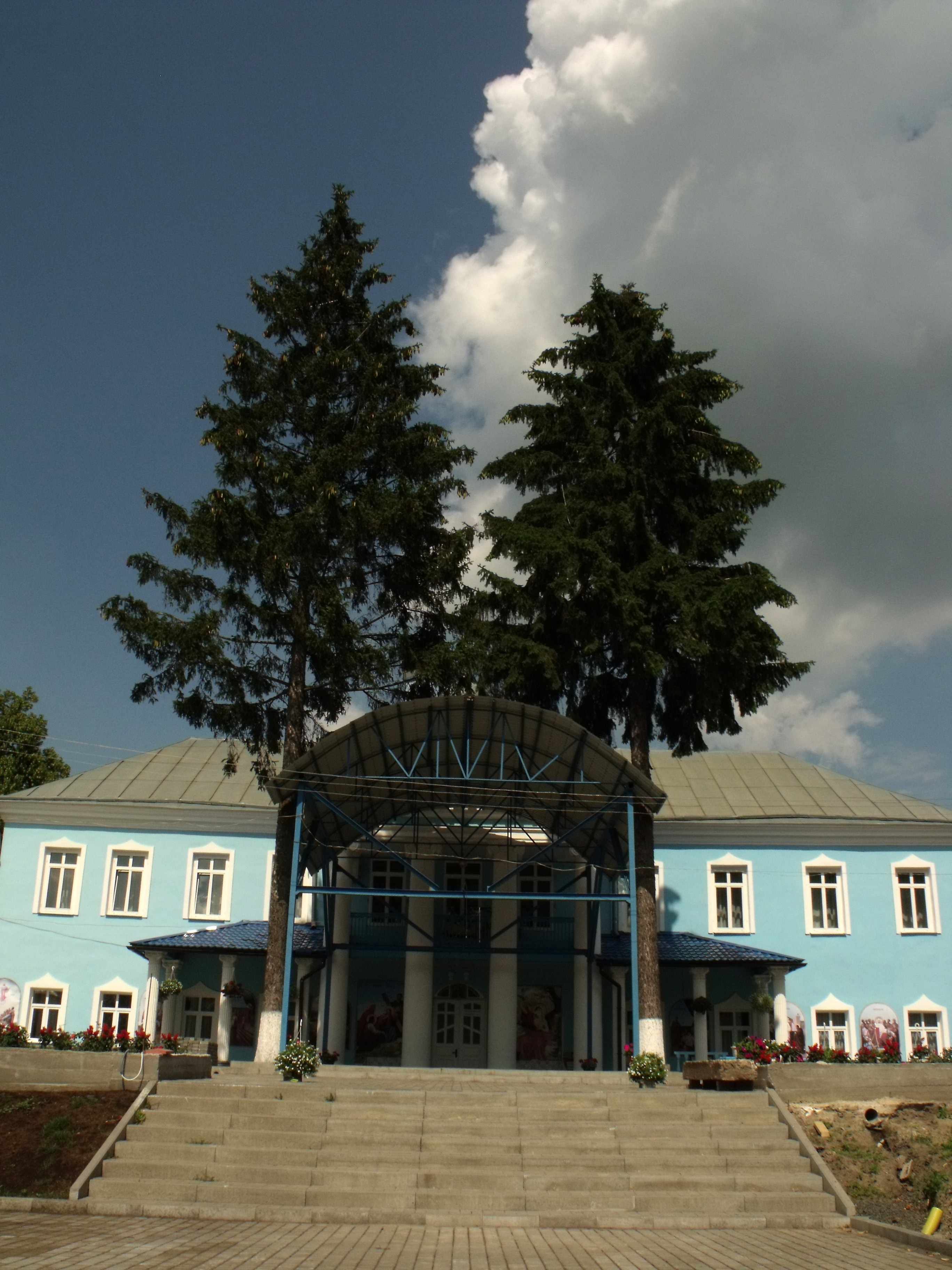 Палац барона фон Штейнгеля: Рівненська обл, с.Городок